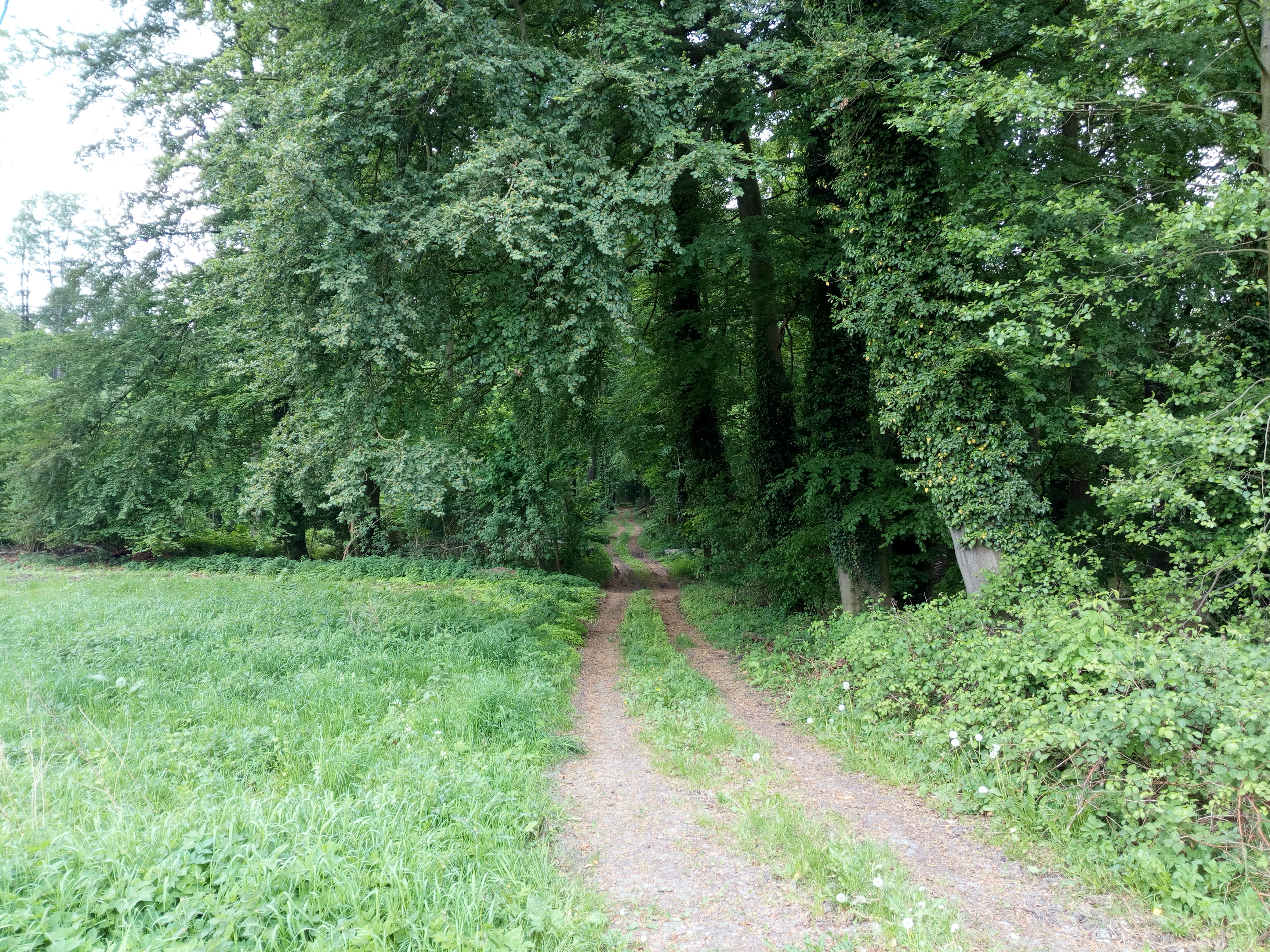 Ein kleines Wäldchen in Melle, gelegen zwischen Eicken-Bruche, Wetter und Barkhausen.